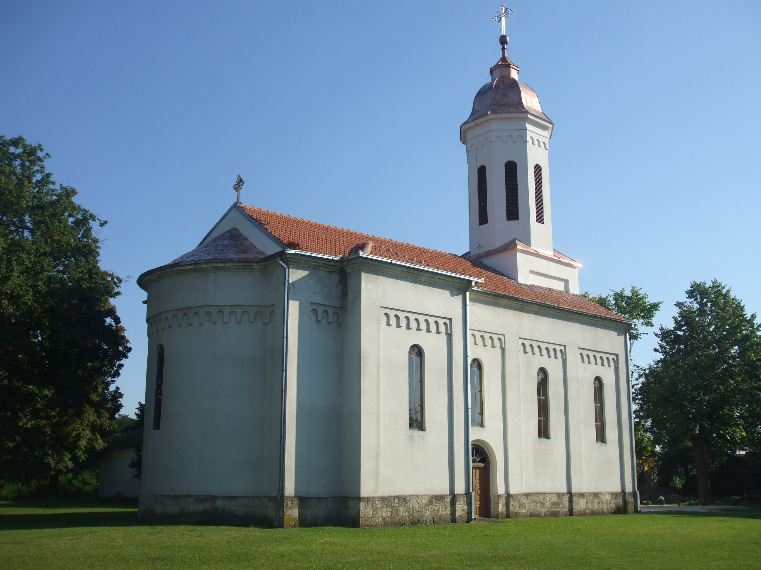 Црква у Наталинцима. Аутор - igniss.